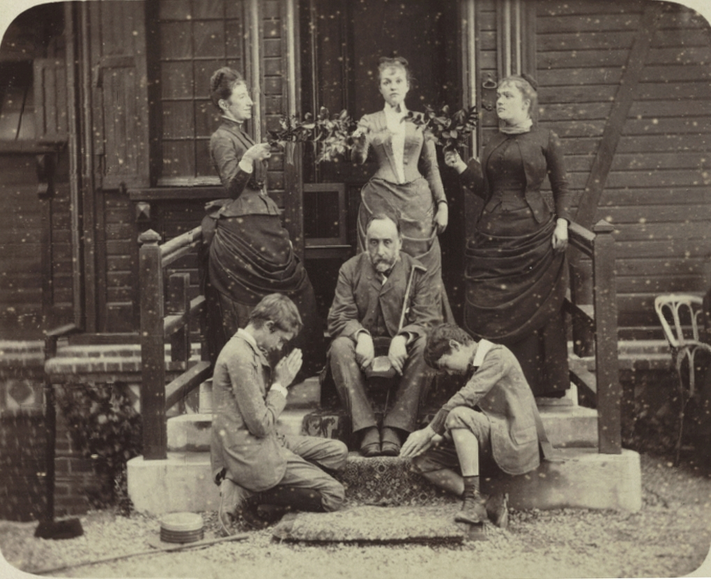 L'Apothéose de Degas, photographie de Walter Barnes, Dieppe 1885. 9 x 11 cm et 10 x 16 cm. Musée d'Orsay, Paris. Inv : PHO 2006 5 1